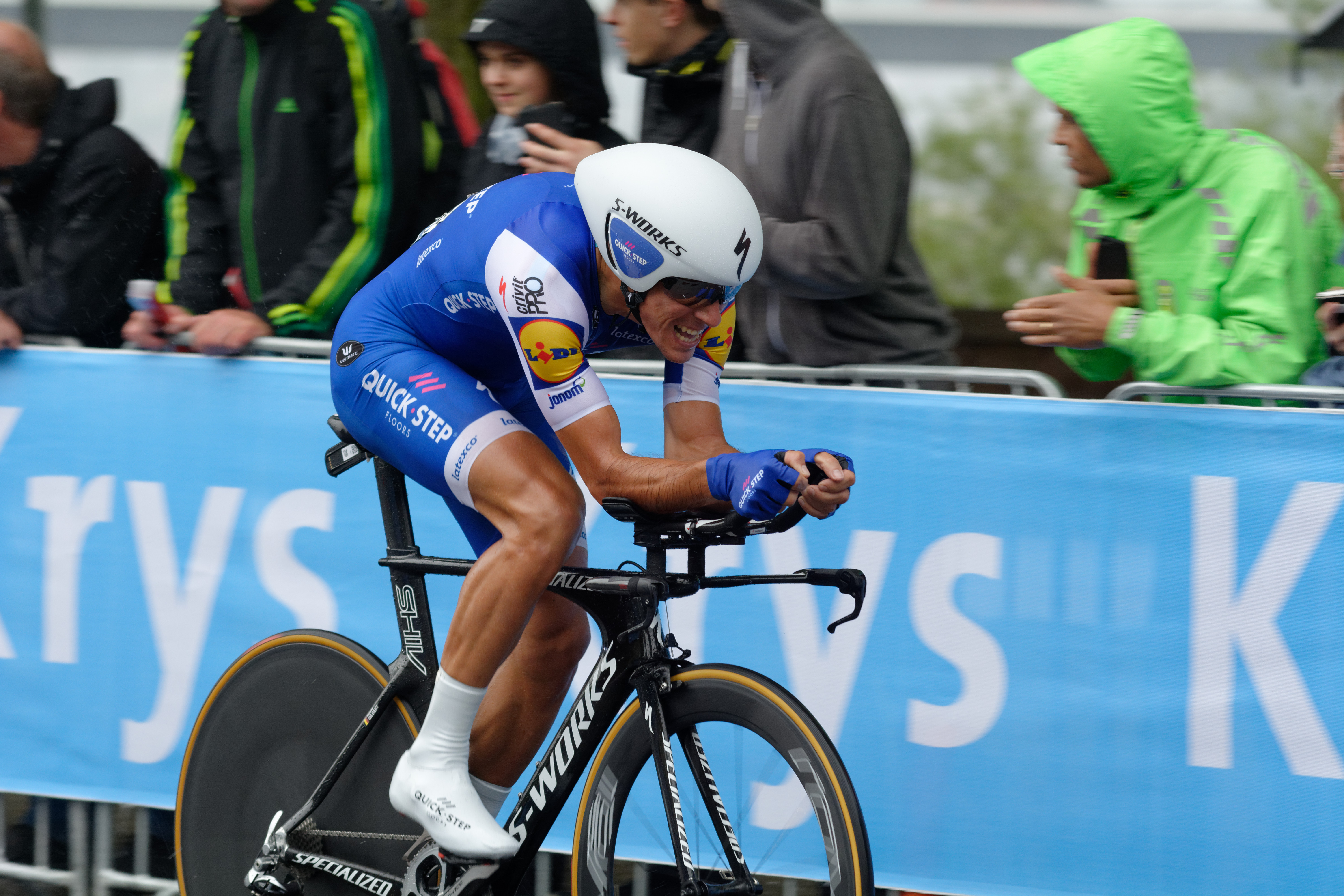 Tour de France 2017 Stage 1 Duesseldolf